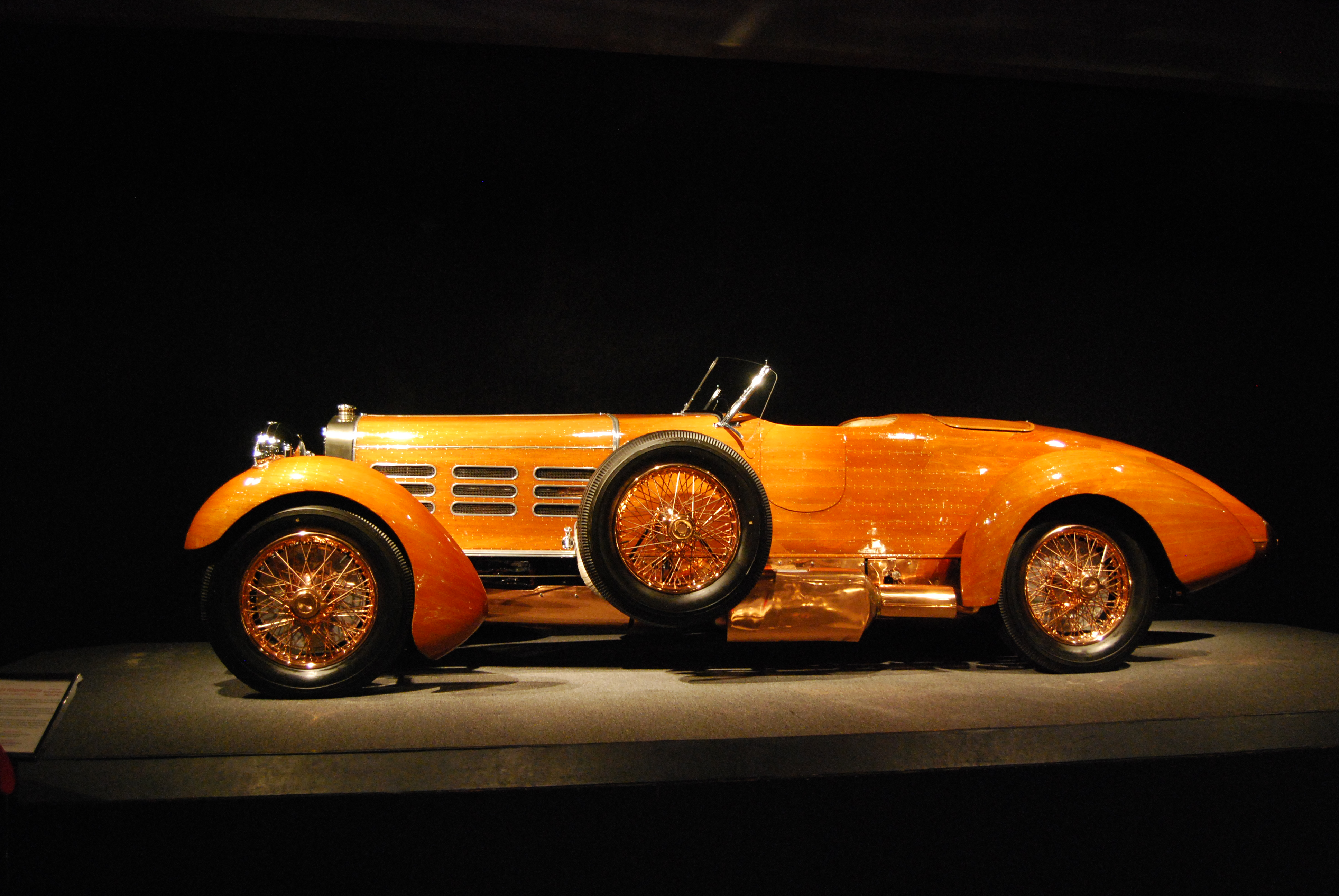 Hispano-Suiza H6-B Nieuport Tulipwood del 1924, esemplare unico commissionato dal pilota André Dubonnet